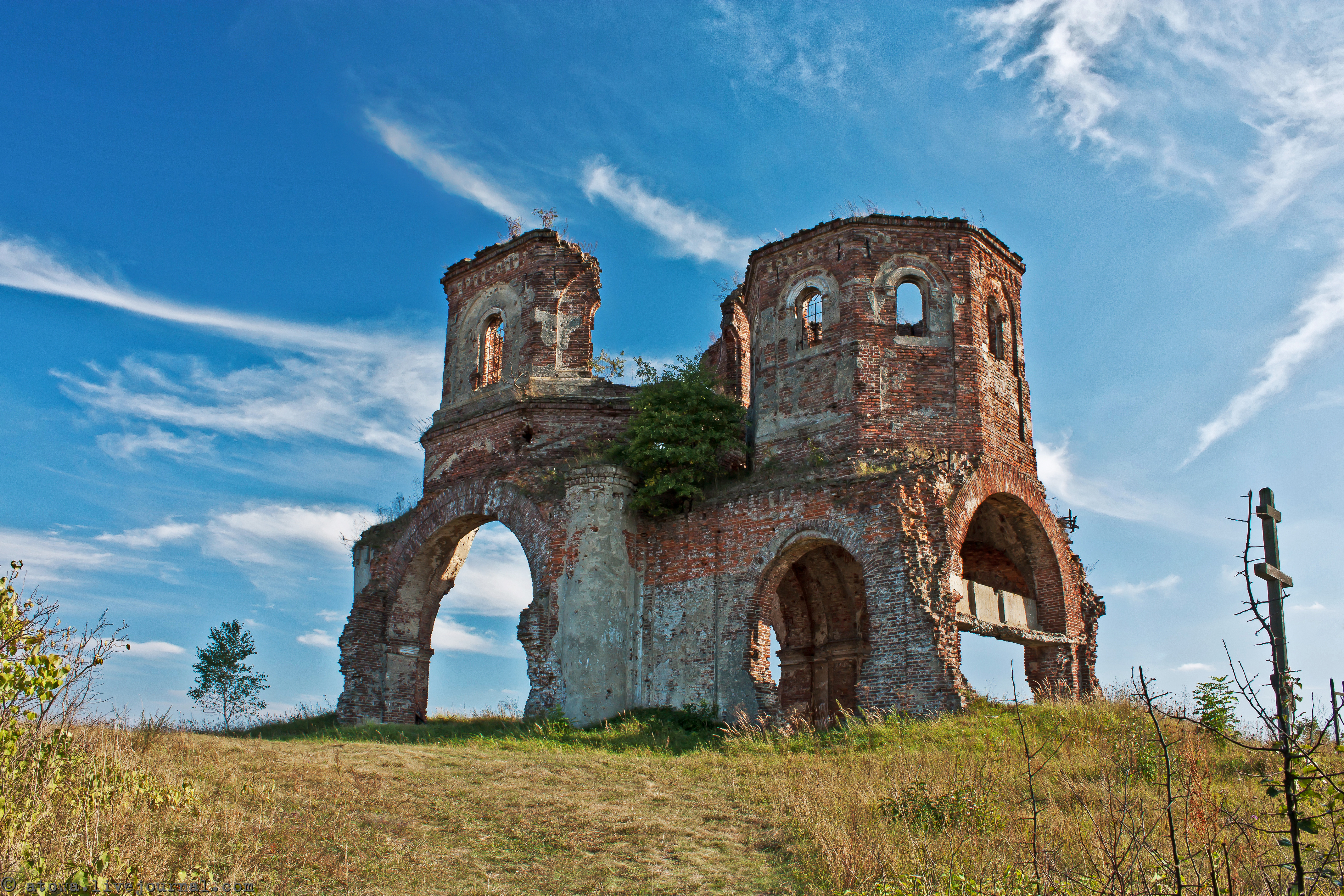 Руїни церкви св. Архистратига Михаїла у колишньому с. Вишенька Велика, 2012 р.